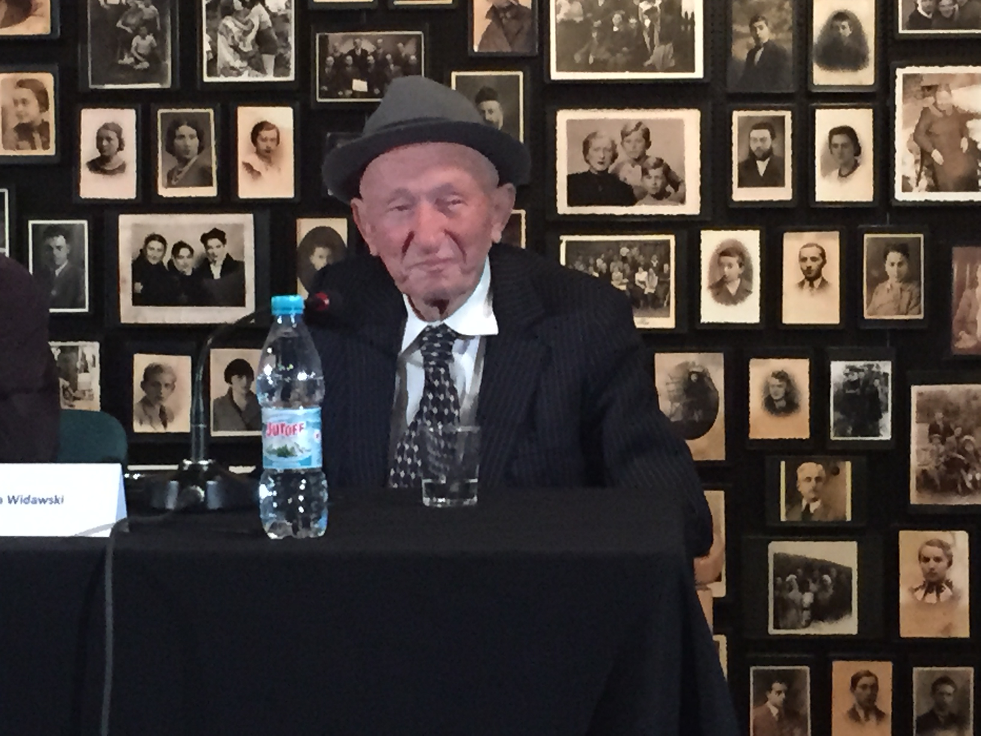 W Oświęcimiu